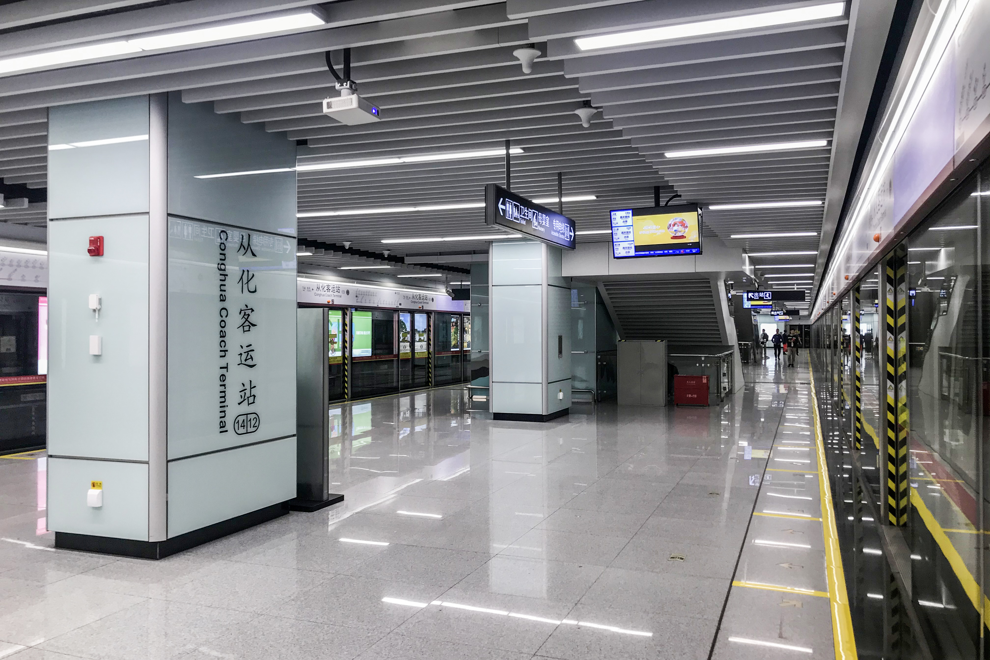 广州地铁从化客运站